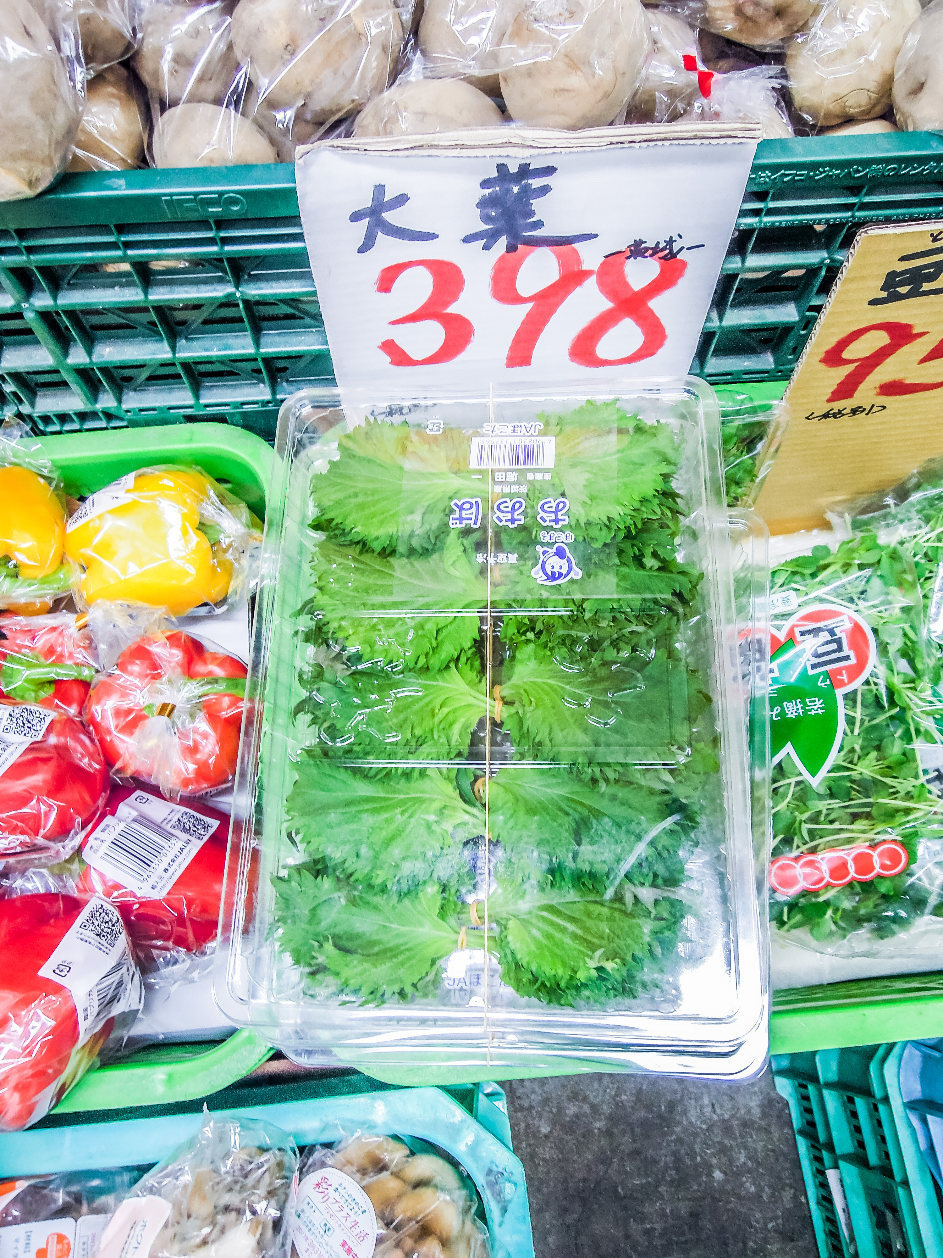 JAPAN 2017